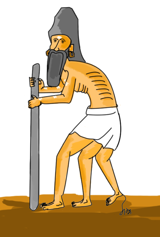 பிருங்கி முனிவர்